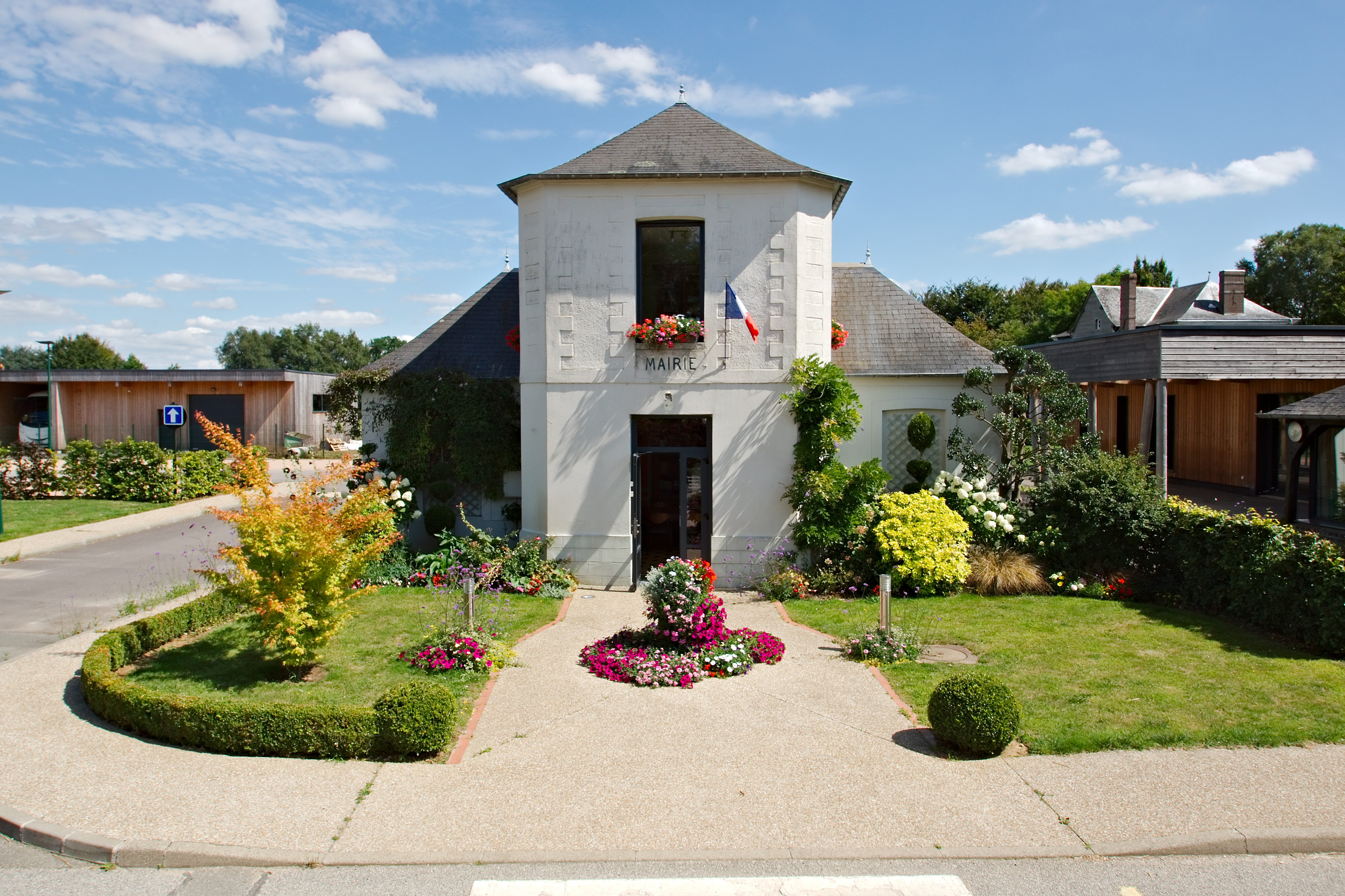 Mairie de Bois-l’Évêque, rue Principale